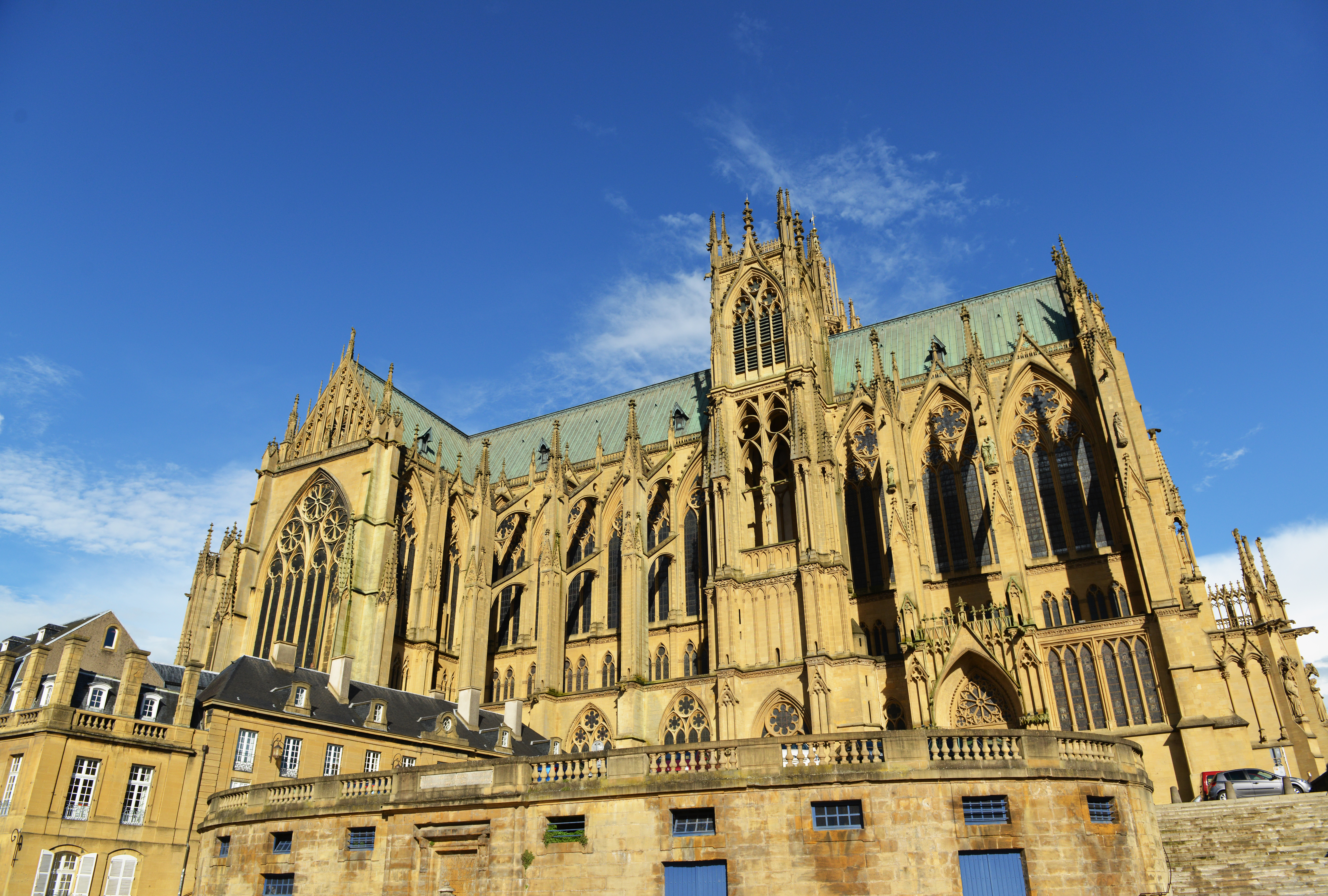 La cathédrale Saint-Étienne de Metz.